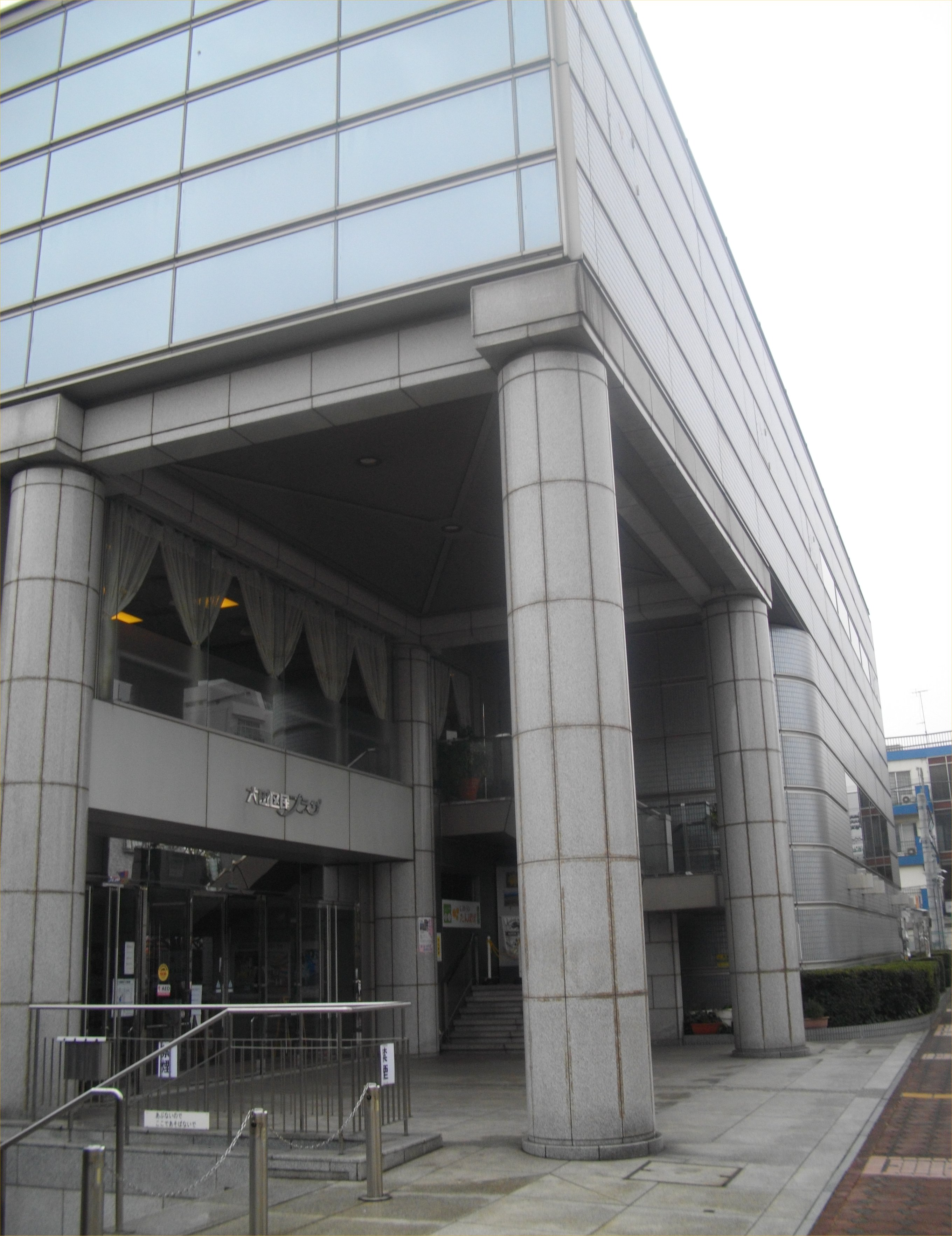 Ota Kumin Plaza in Shimomaruko, Ota Ward, Tokyo, Japan